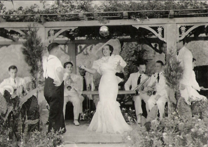 Carmen Miranda no Filme 'Alô, Alô Brasil' de 1935.